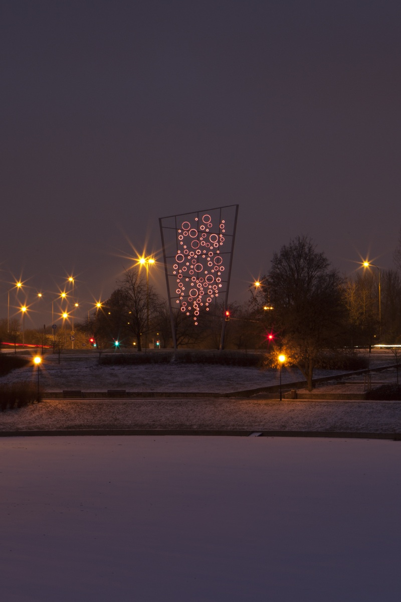 Światłotrysk to instalacja parkowa ze światła neonowego umieszczona w ogólnodostępnej przestrzeni miejskiej, na terenie parku Kępa Potocka na warszawskim Żoliborzu. Neon, w kształcie wielkiej szklanki z uciekającymi w niebo bąbelkami różowej oranżady ma 17 metrów wysokości i został zaprojektowany przez Maurycego Gomulickiego. Producent: Fundacja Bęc Zmiana